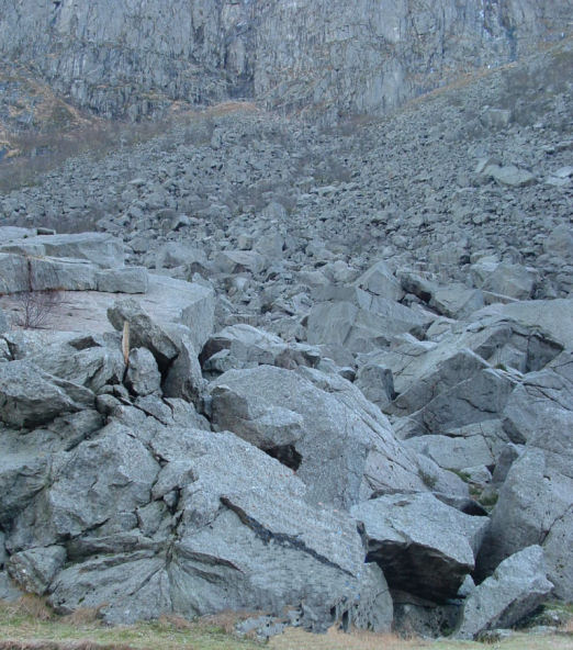 Gloppedalsura